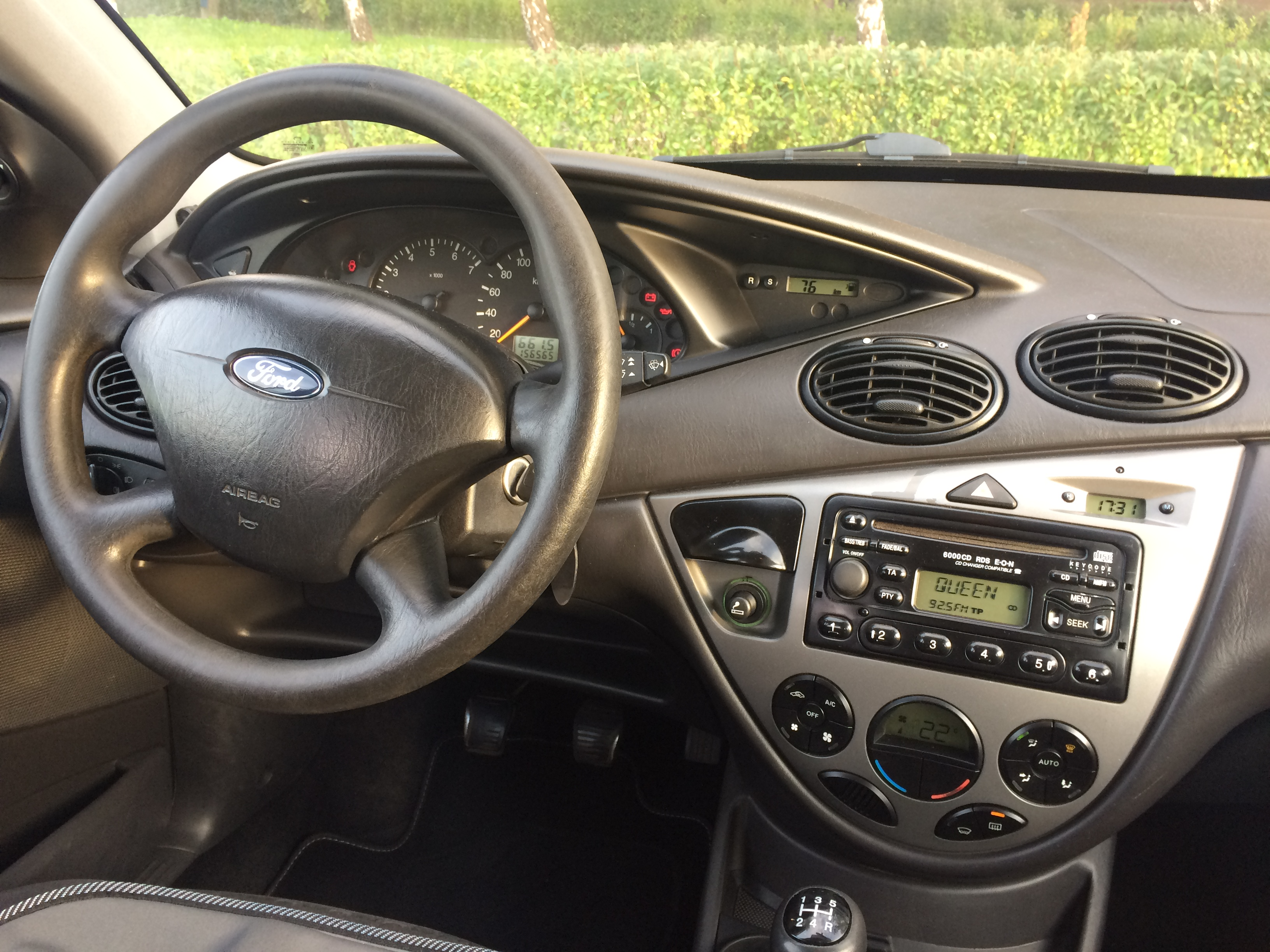 Deska rozdzielcza Forda Focusa Mk1 X100 z 2003 roku